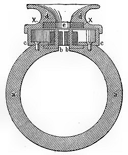 Aders Fernsprecher (Querschnitt)